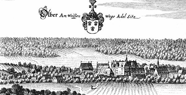 Oelber am weißen Wege nach Merian Foto hochgeladen von Benutzer Benutzer:AxelHH, April 2006